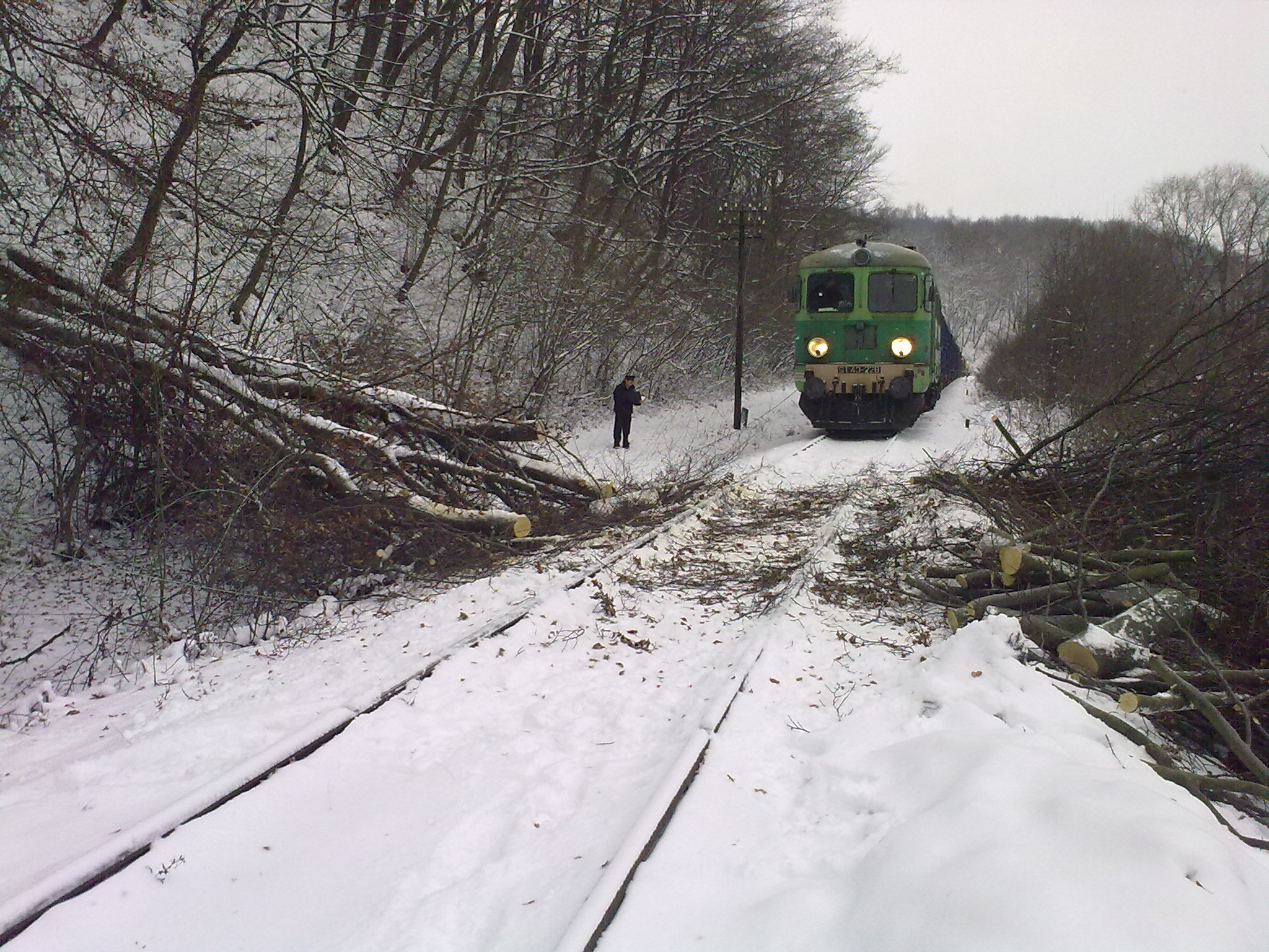 Drzewo spadło na tory, uszkadzając linię teletechniczną i unieruchamiając skład towarowy z kwasem siarkowym między Sanokiem a Zagórzem.